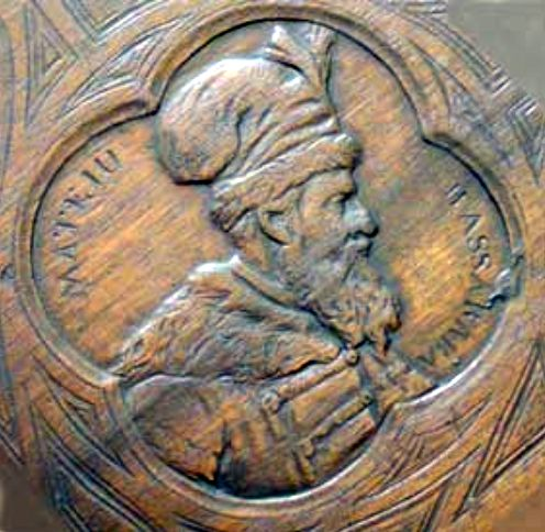 Matei Basarab - efigie sculptată pe blatul mesei cu care Theodor Aman a câștigat Medalia de clasa a II-a a Expoziției artiștilor în viață din anul 1870 - Muzeul Theodor Aman din București